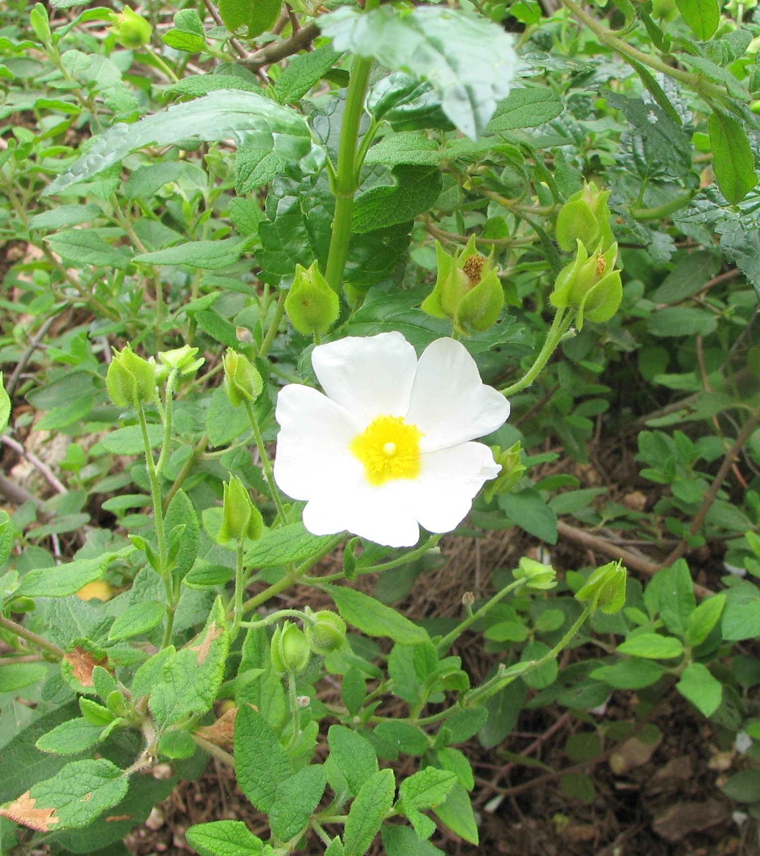 Park Nesher in the city Nesher on Mount Carmel, Israel. In the park there are 2 Suspension bridges, walking paths, Mediterranean forests, woodlands, scrub and flowers. A place for picnic, and playground. פארק נשר בעיר נשר ליד חיפה. הפארק שוכן בהר הכרמל. בפארק שני גשרים תלויים, חורש ים תיכוני, שפע פרחים, וחיות בר. בפארק אזור המיועד לפיקניק שולחנות וספסלים וכן מגרש משחקים לילדים. בואדי קטיע העובר בפארק מסלולי הליכה מסומנים העוברים בואדי ועל מורדותיו. ומערה פרהיסטורית. בפארק גם דרך העוברת על צלע ההר ישירות לגשרים, בה ניתן ללכת גם עם עגלות ילדים וכן ספסלי ישיבה ומרפסות תצפית. מהואדי ניתן לראות תצפיות על אוניברסיטת חיפה ועל שכונותיה של העיר נשר לושם מרווני